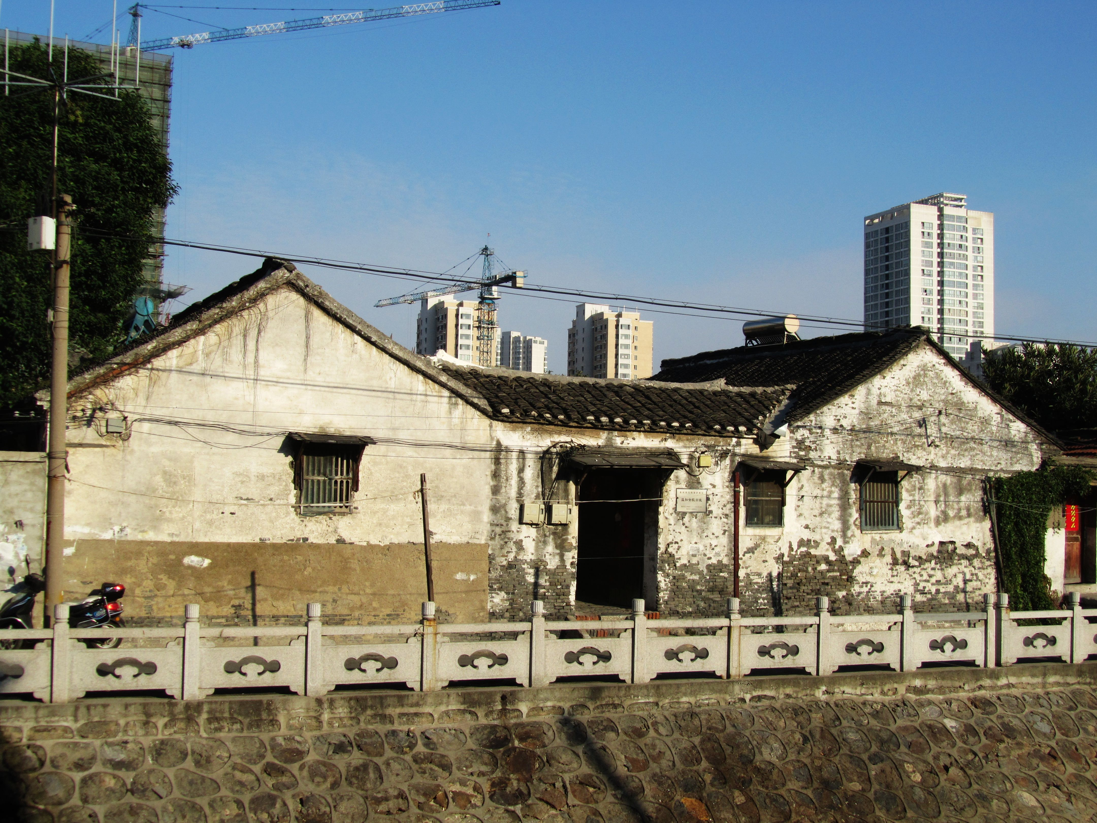 泰州涵东街温知女校旧址。